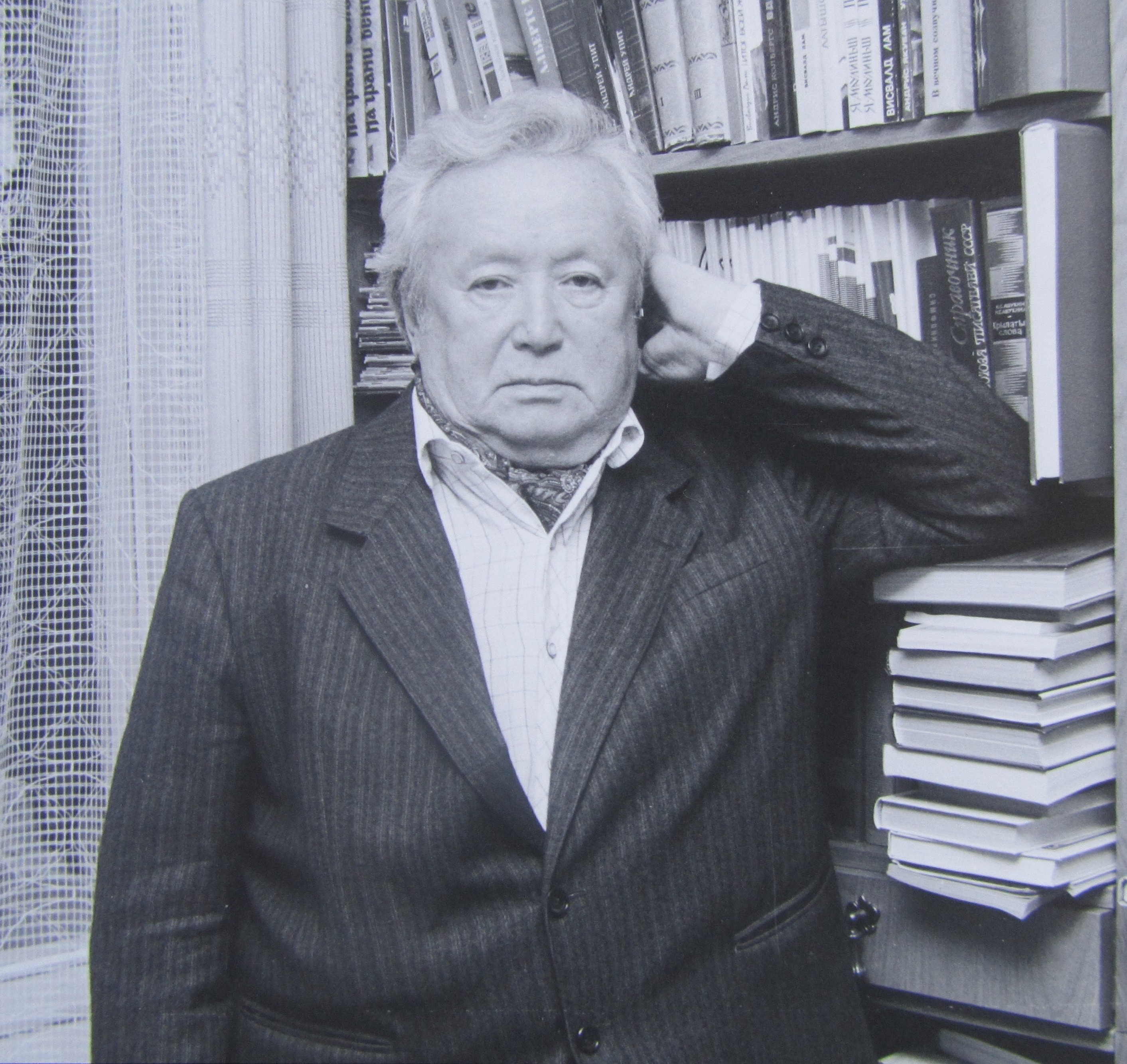 Юрий Иванович Абызов